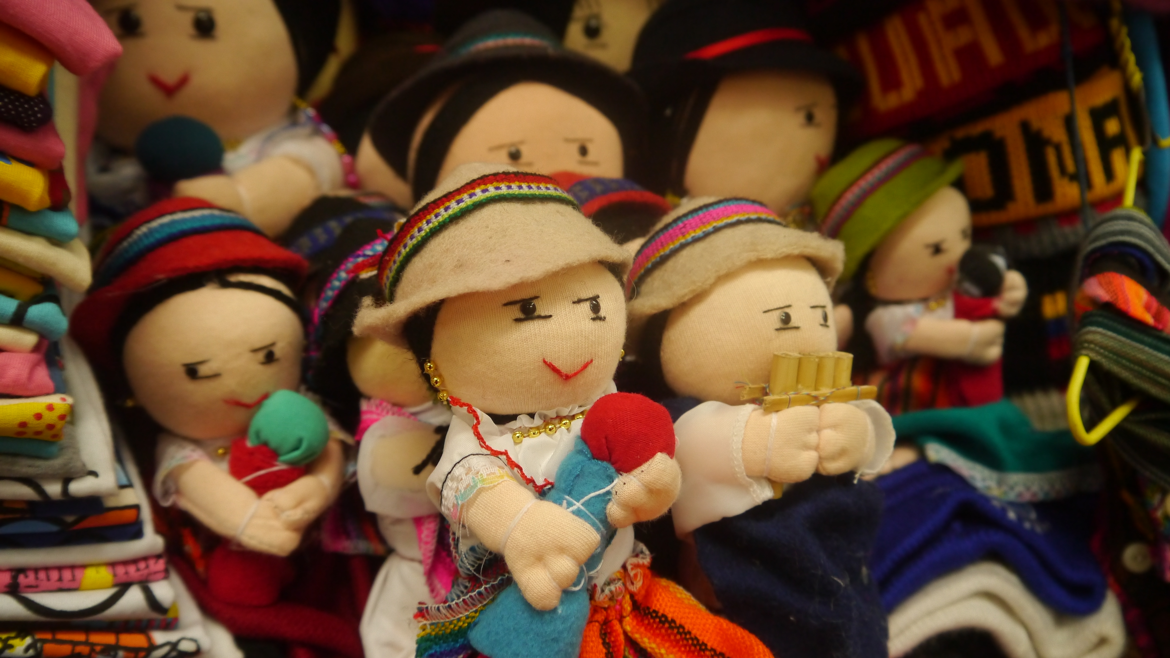 Muñecas de trapo del Mercado Artesanal de Guayaquil.